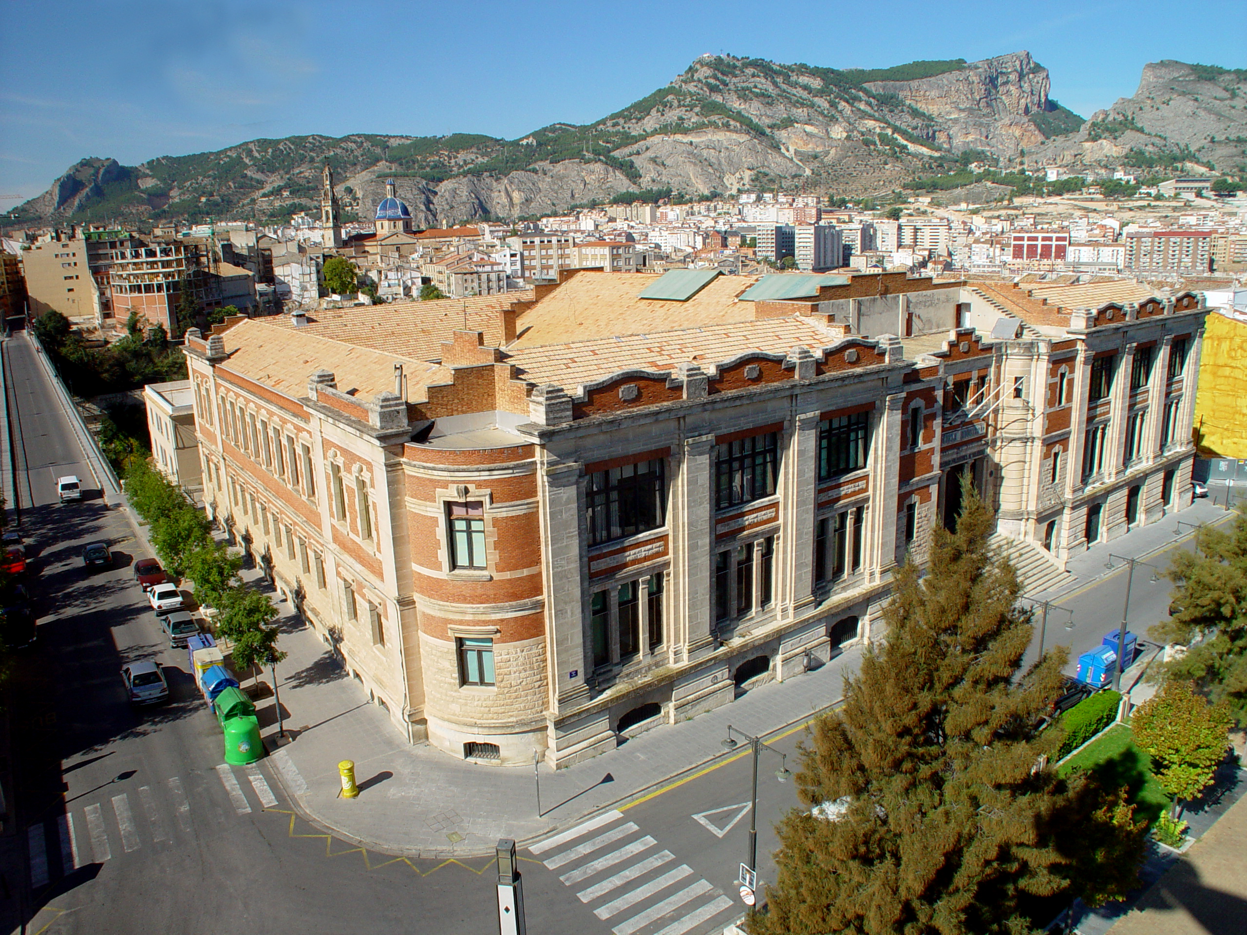 Edificio Viaducto (EPSA)